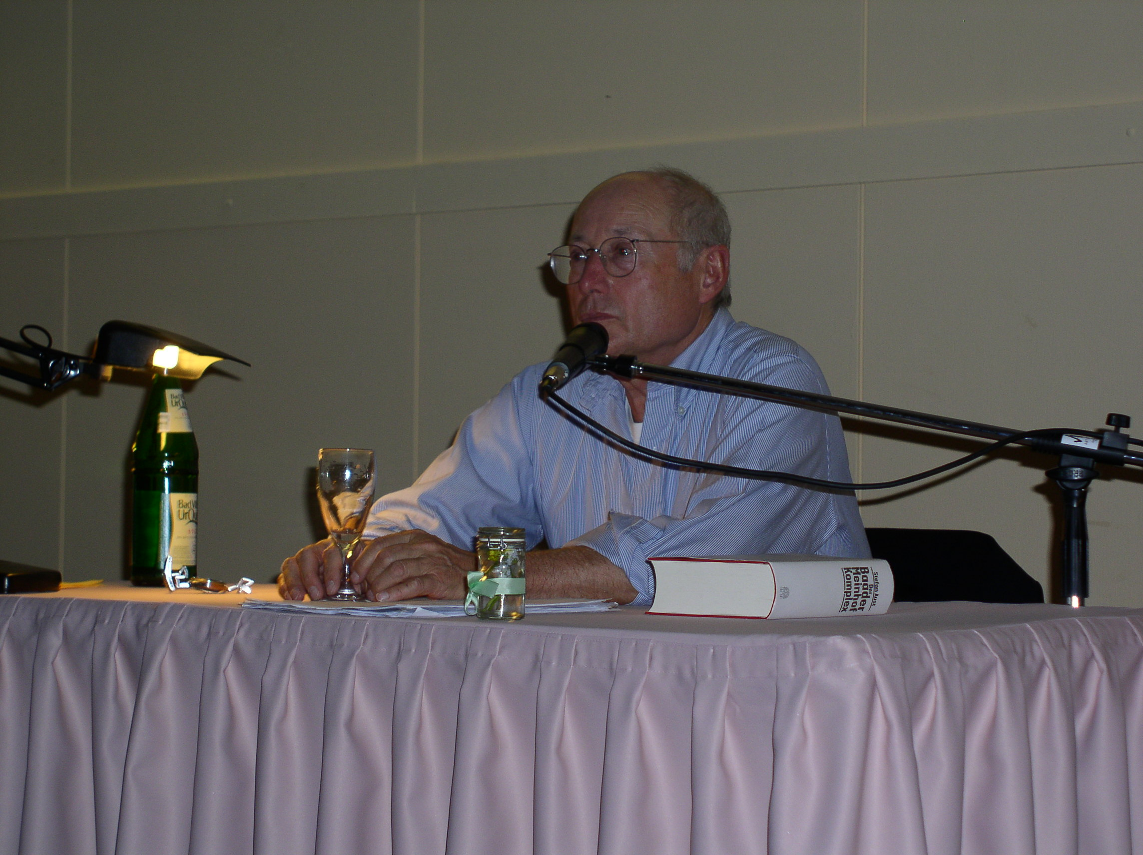 Buchlesung Bad Langensalza